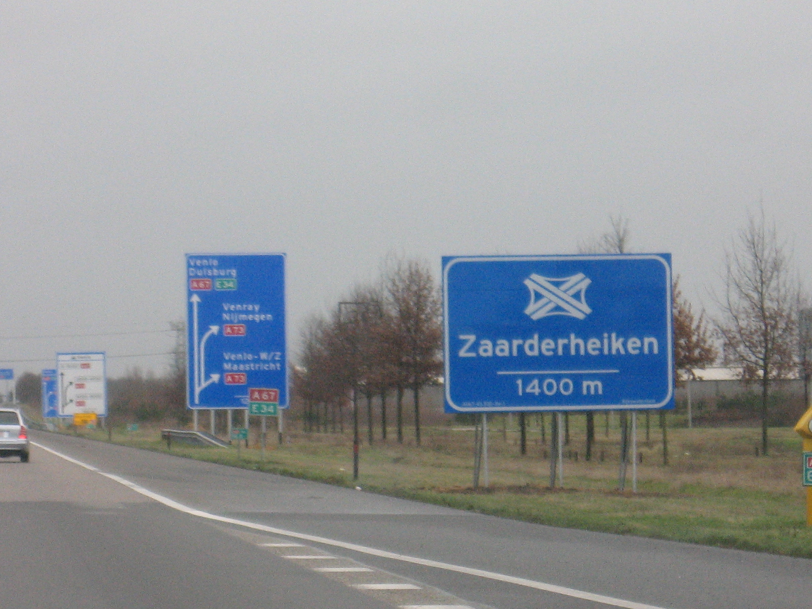 Venlo